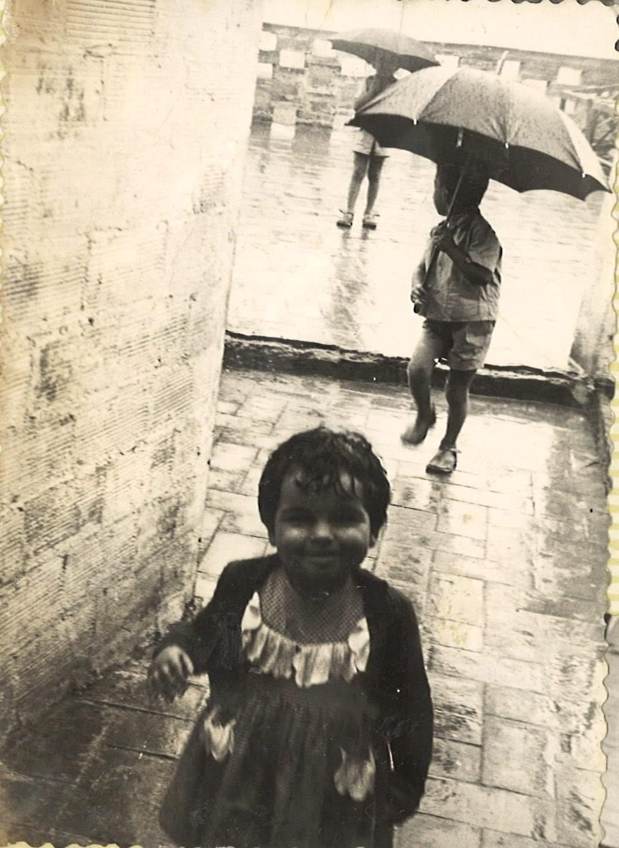 La M. Carme Junyent abans de saber que les llengües eren més divertides que la pluja.